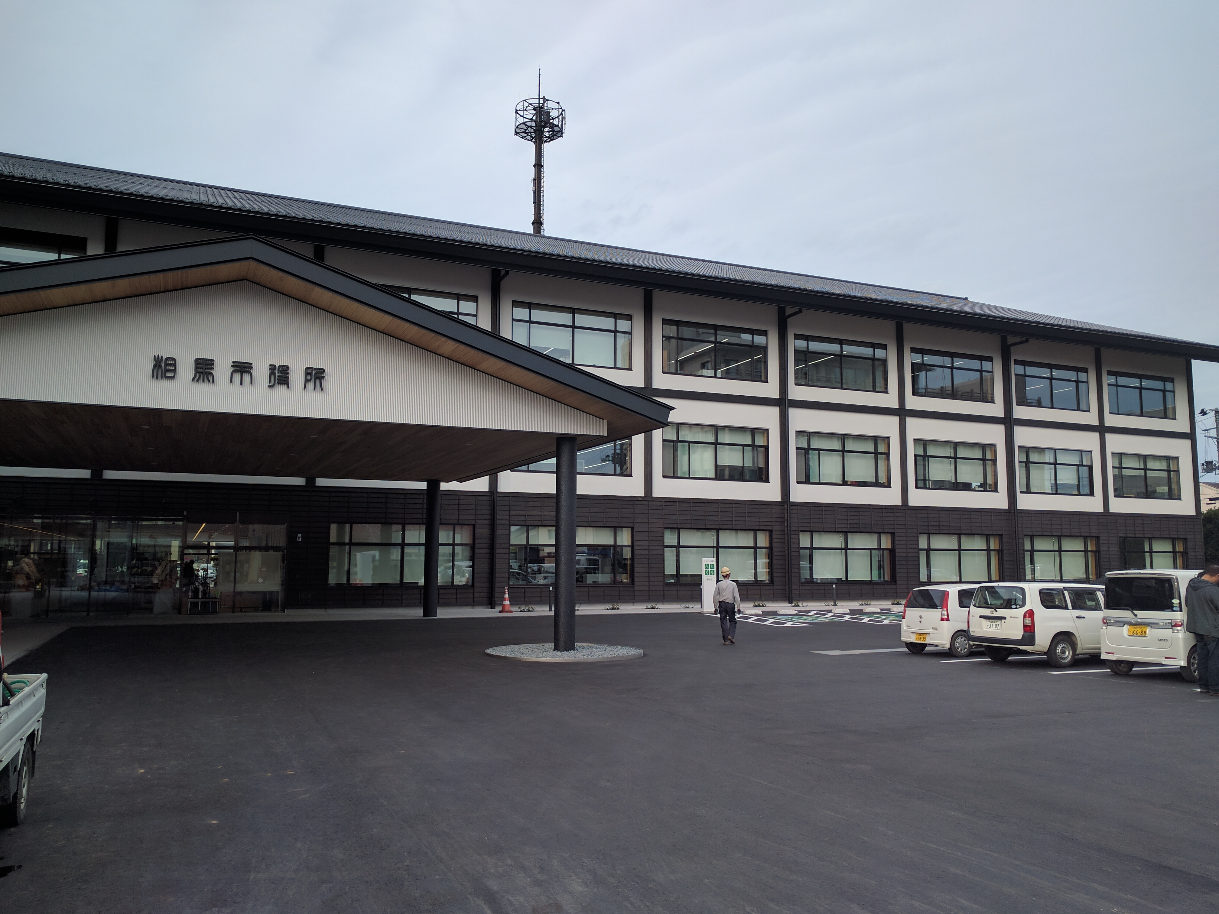 相馬市役所の外観写真